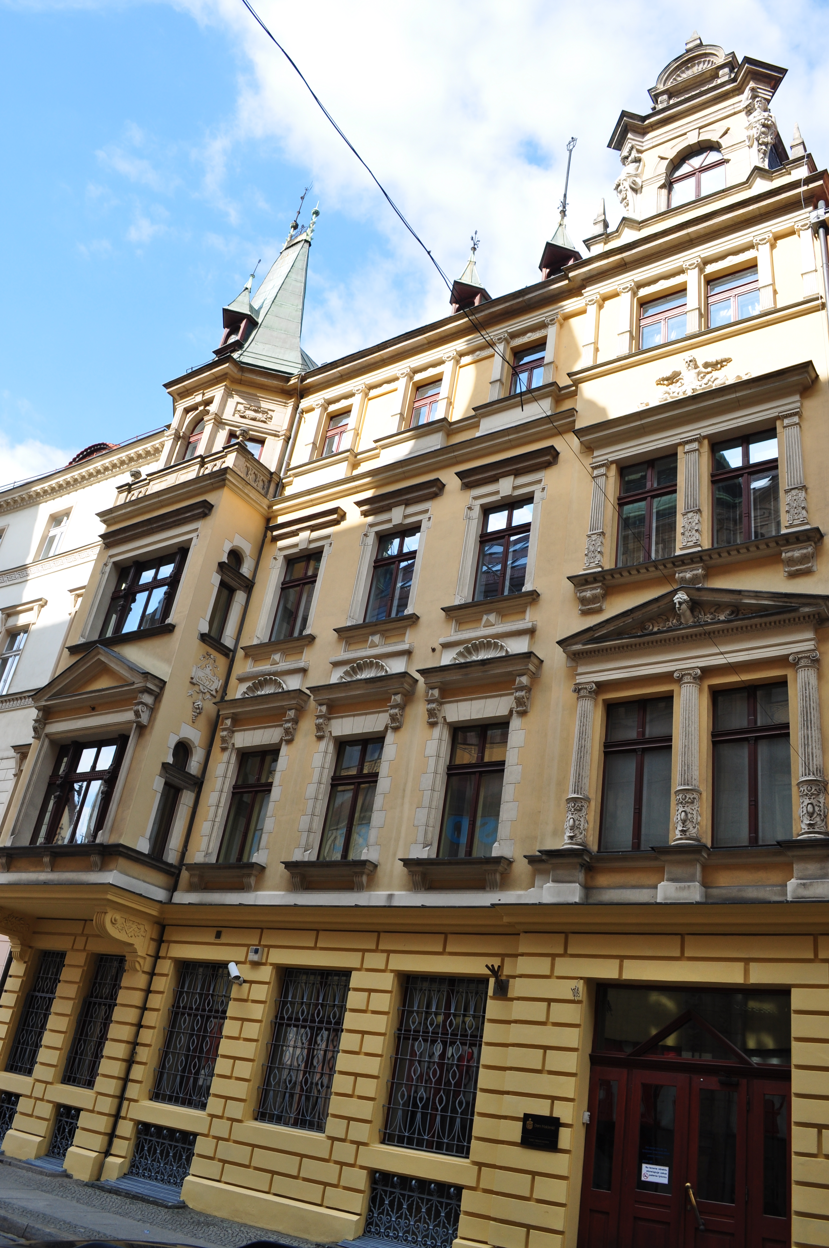 Wrocław, Rynek 33, kamienica, ob. Bank PKO BP, pocz. XIX w. Widok od strony ul. Kurzy Targ